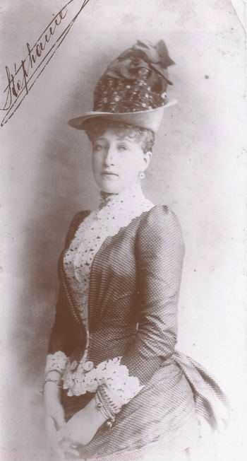 Stephanie von Belgien (1864-1945). Fotografie von Ludwig Grillich (1855-1926).[1] ↑ Vgl. Österreichische Nationalbibliothek, Bildarchiv Austria, Inventarnr. Pk 499, 2/102